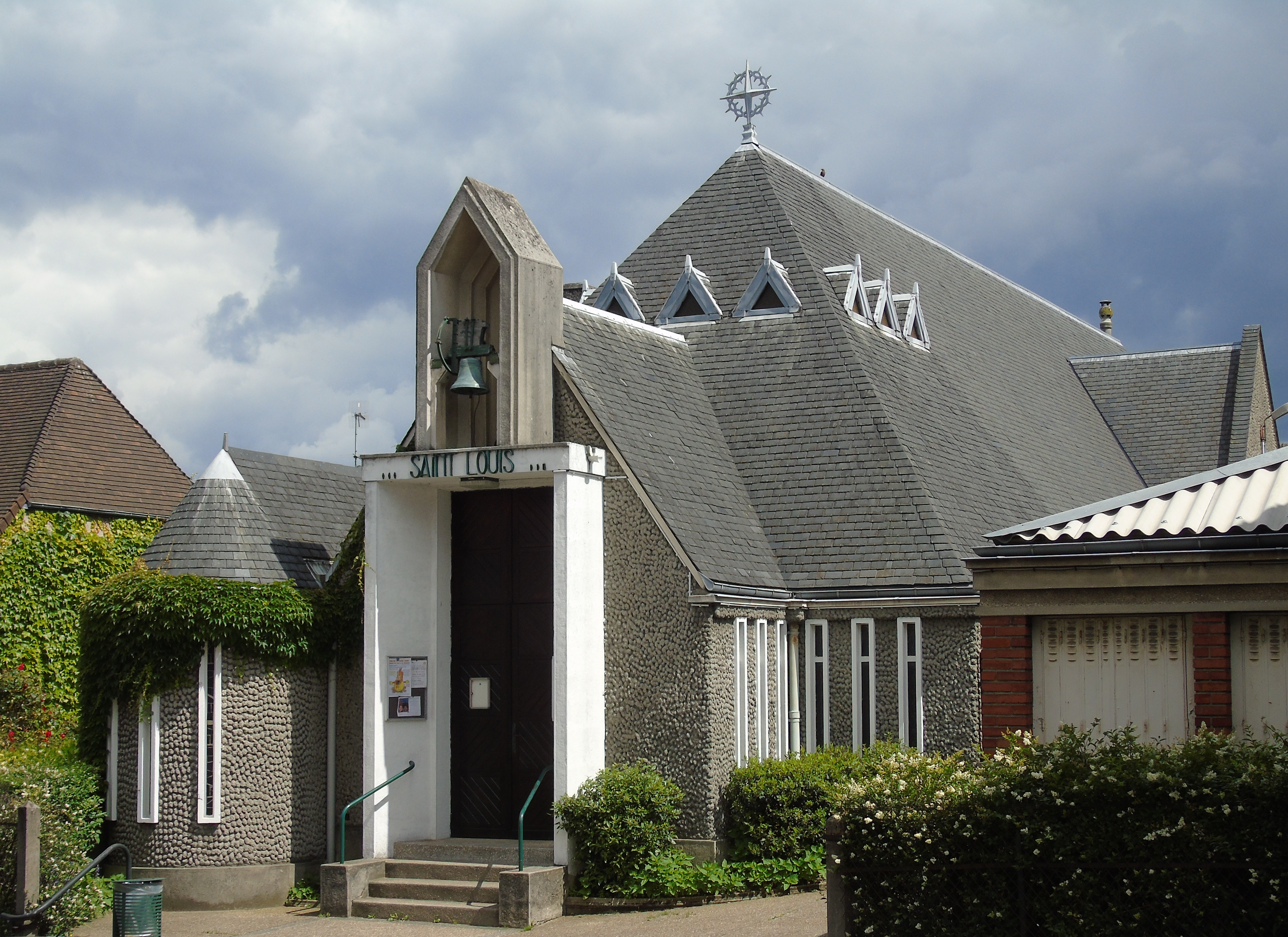 Chapelle Saint-Louis de Suresnes.